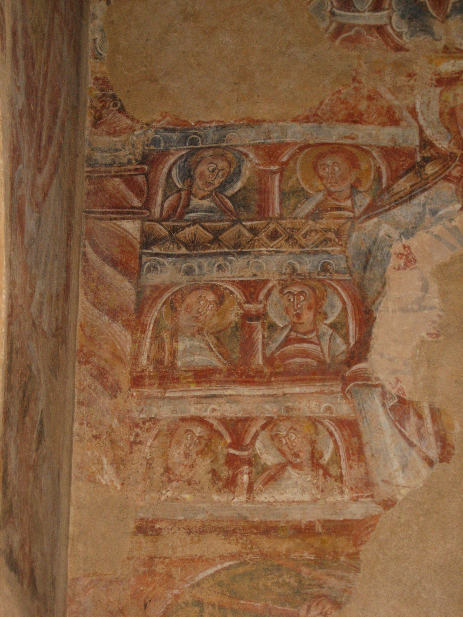 Le paradis, détail du mur sur du chœur de l'église